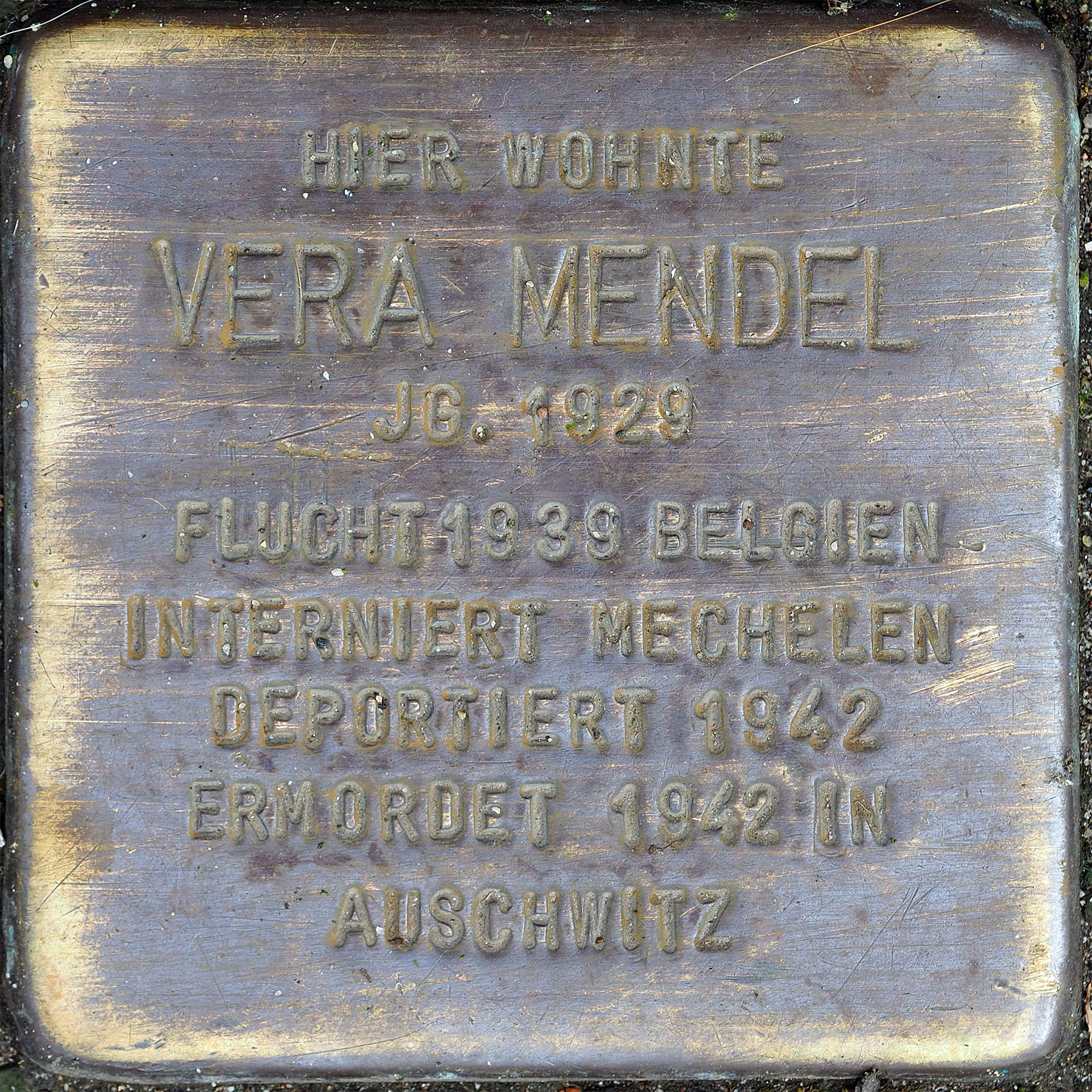 Stolpersteine MG: Mendel, Vera